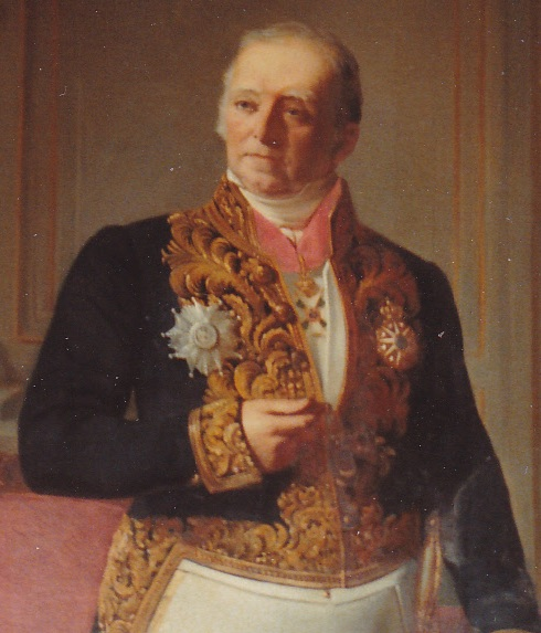 Auguste Pierre Rémi Mimerel, né le 1er juin 1786 à Amiens (Somme) et mort le 16 avril 1871 à Roubaix, est un industriel et homme politique français.